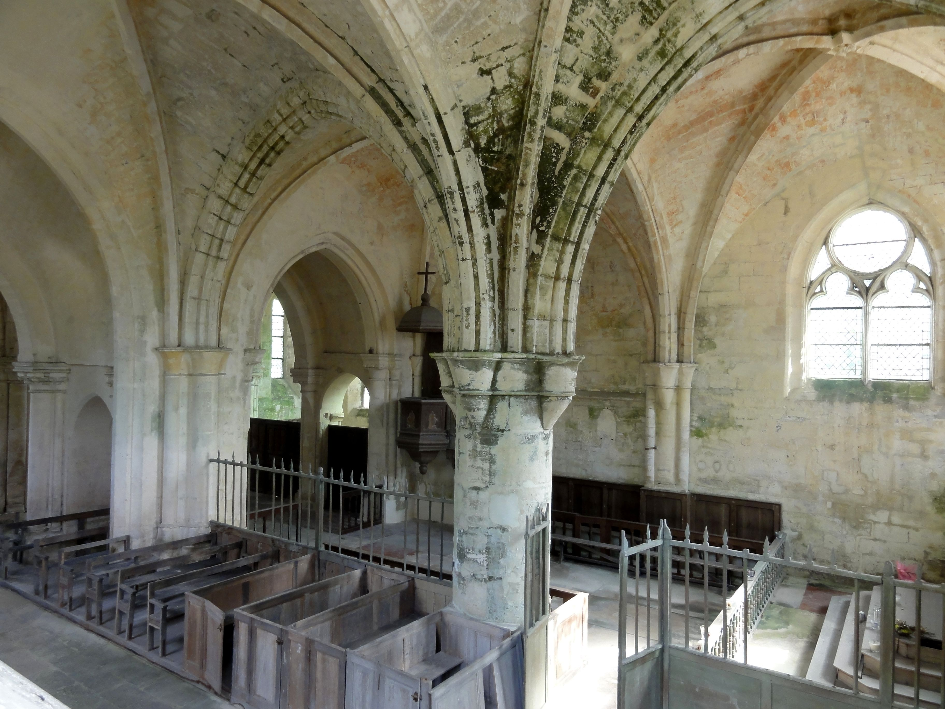 Chœur et collatéral, vue générale depuis le sud.